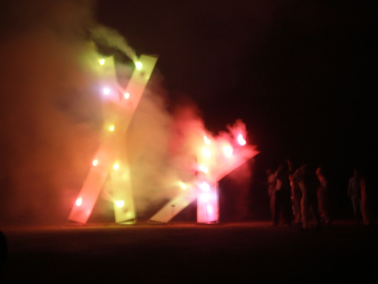 Festa de foc i llum de "Lo Festeto", a Ponts (Lleida).